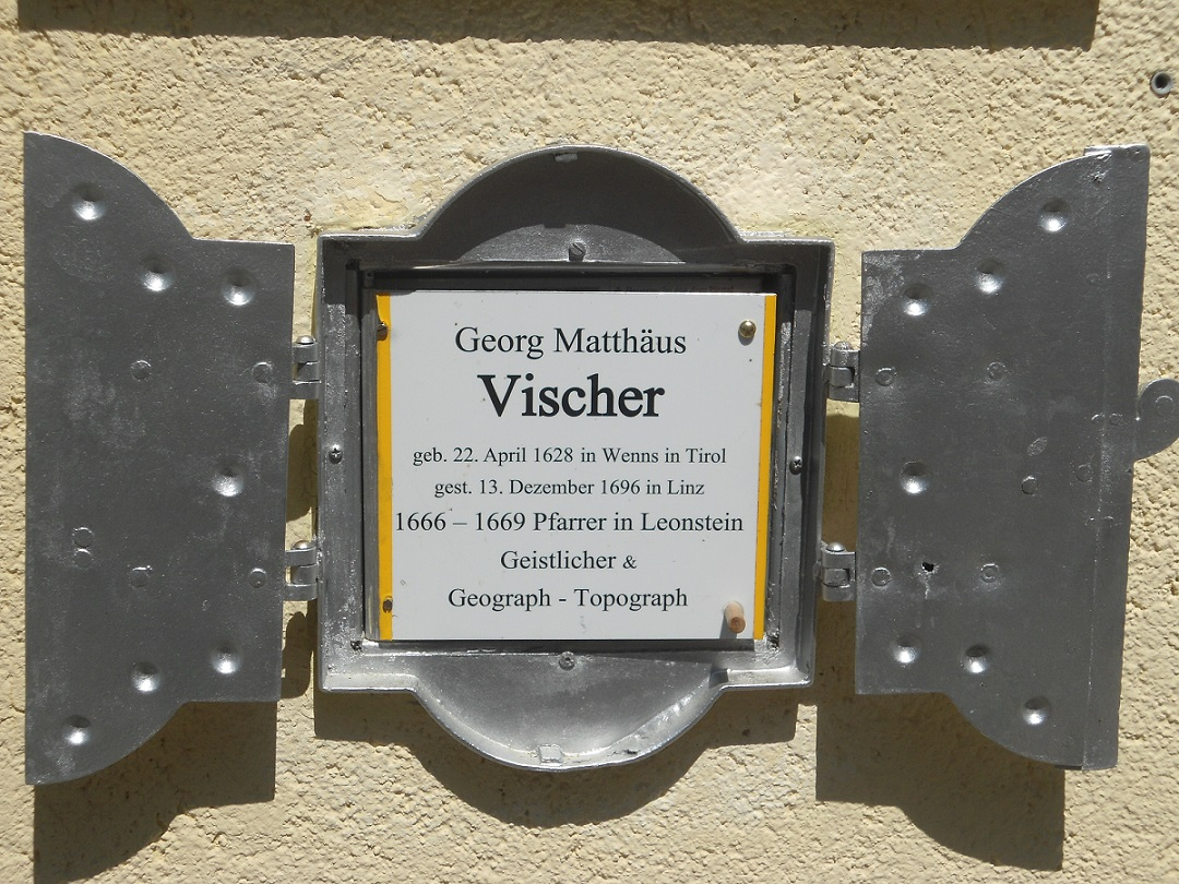 Gedenktafel an Vischer Georg Matthäus am Friedhof in Leonstein Oberösterreich - CC